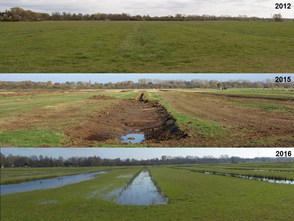 Wiederherstellung von 20 km Beetgräben im Westen im Rahmen einer Ausgleichsmaßnahme. 2012 Intensivgrünland, 2015 Wiederherstellung, 2016 erstes Vegetationsjahr mit hohen Wasserständen